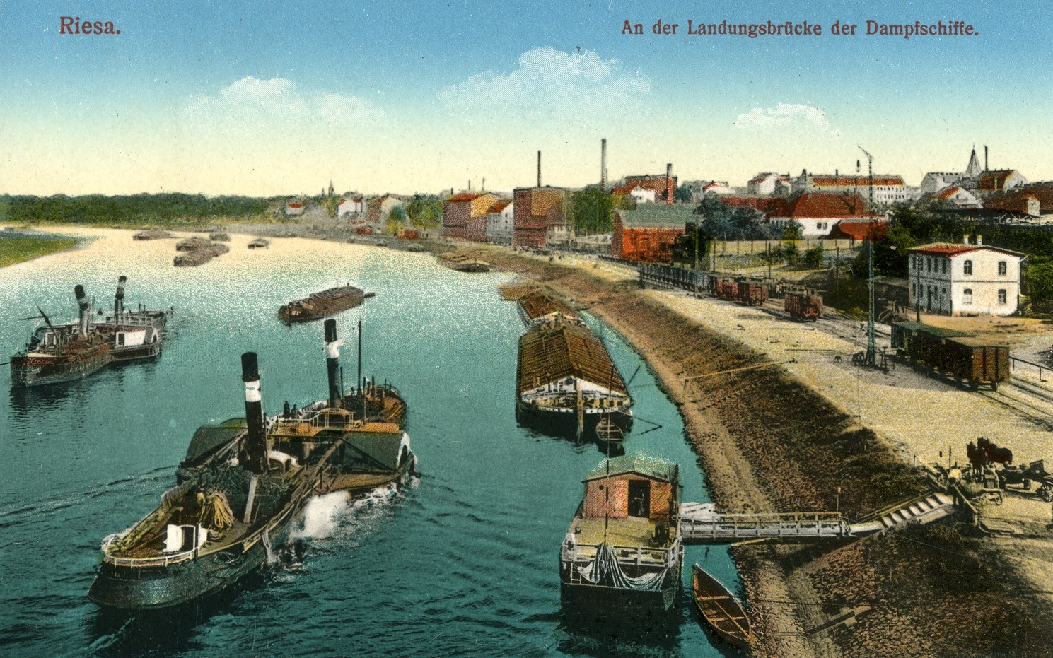 Riesa; Landungsbrücke mit Schleppern und Lastkähnen This postcard is from publisher Brück & Sohn in Meißen ( postcard has a unique number 11648 and is available in a higher resolution at the publisher. This images was uploaded in a cooperation project between Wikipedians and the publisher.